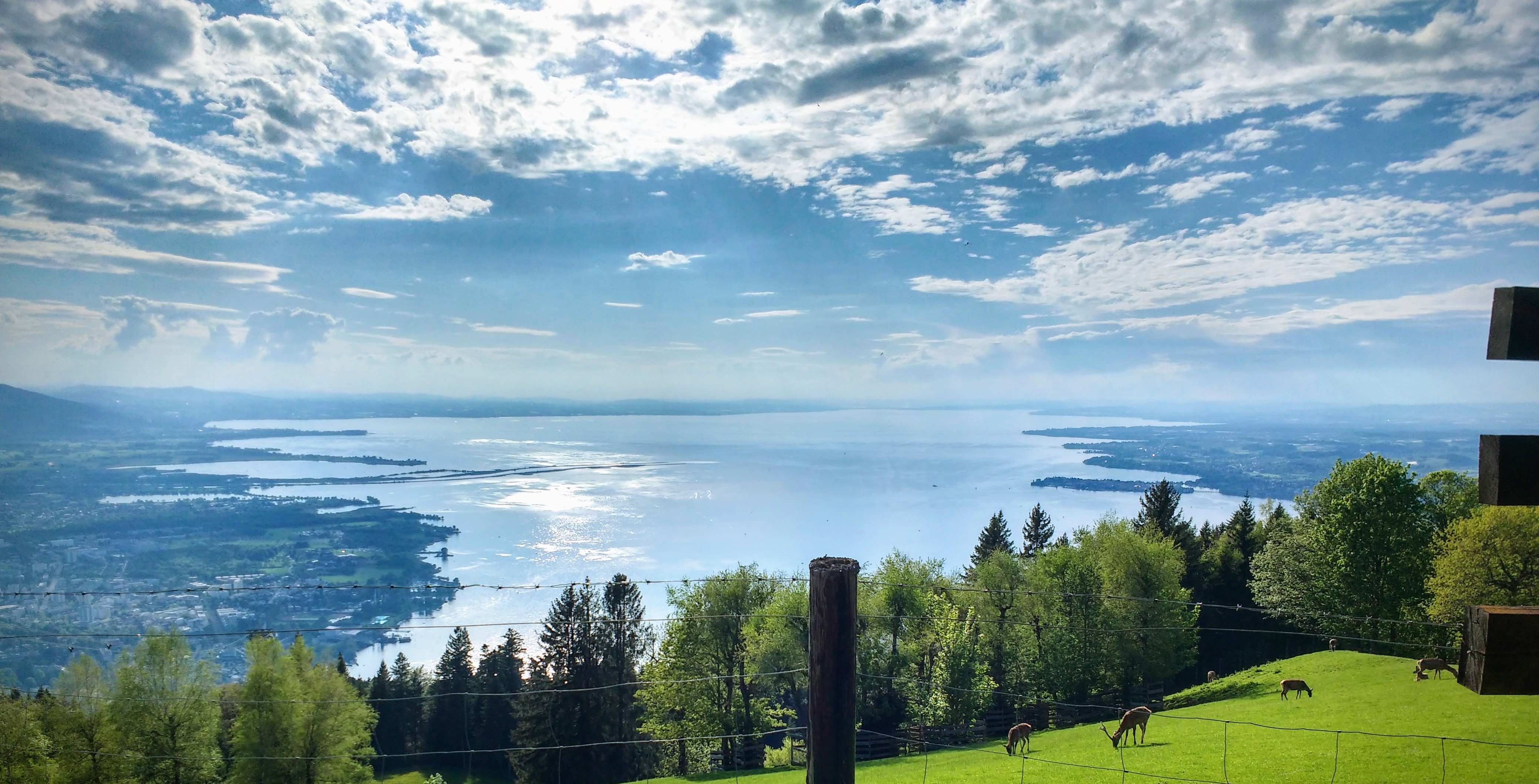 Panorama: Blick vom Pfänder auf den Bodensee